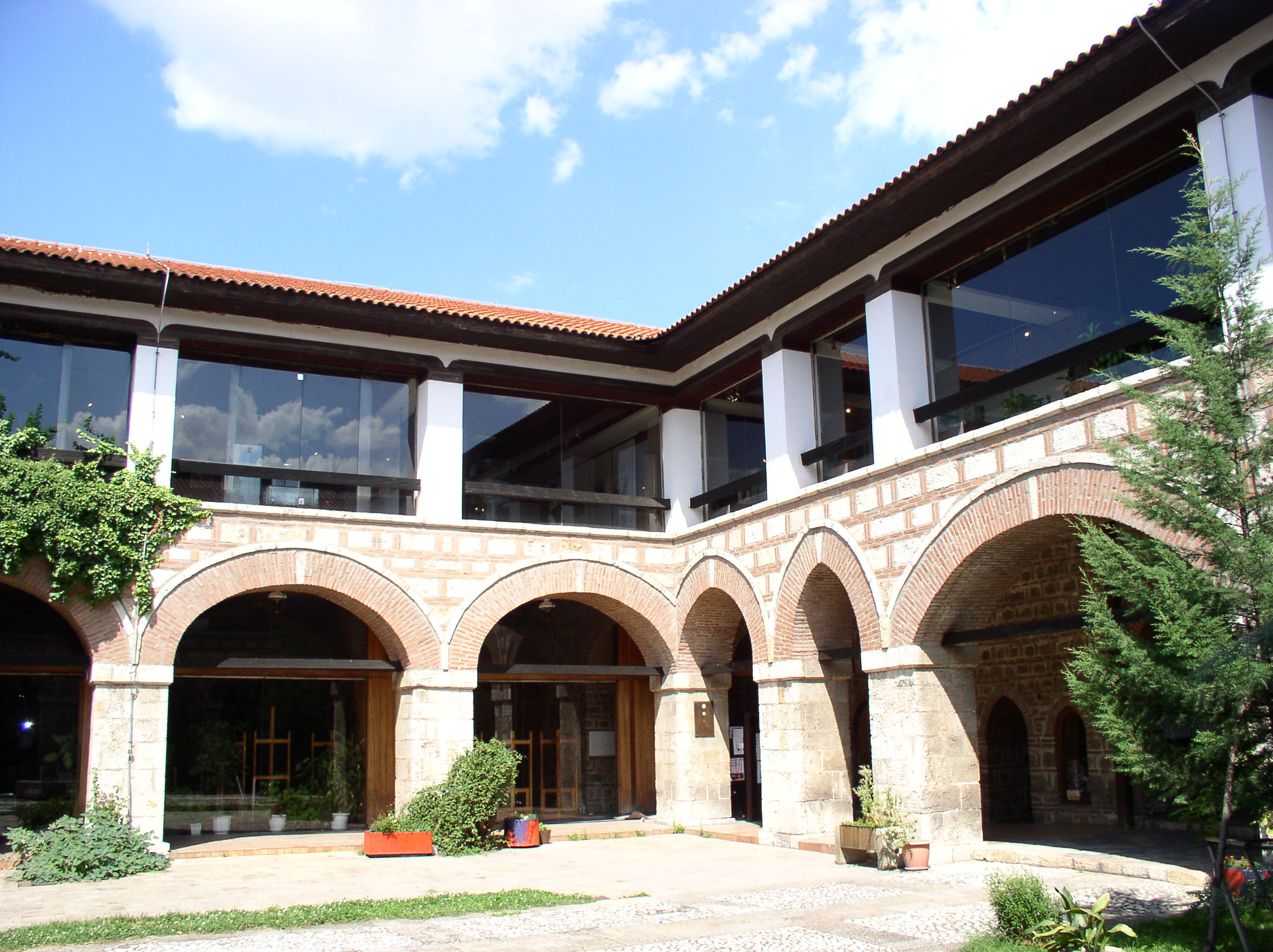 Унутрашње двориште Сули хана у Скопљу у Старој скопској чаршији, данас Факултет ликовних уметности